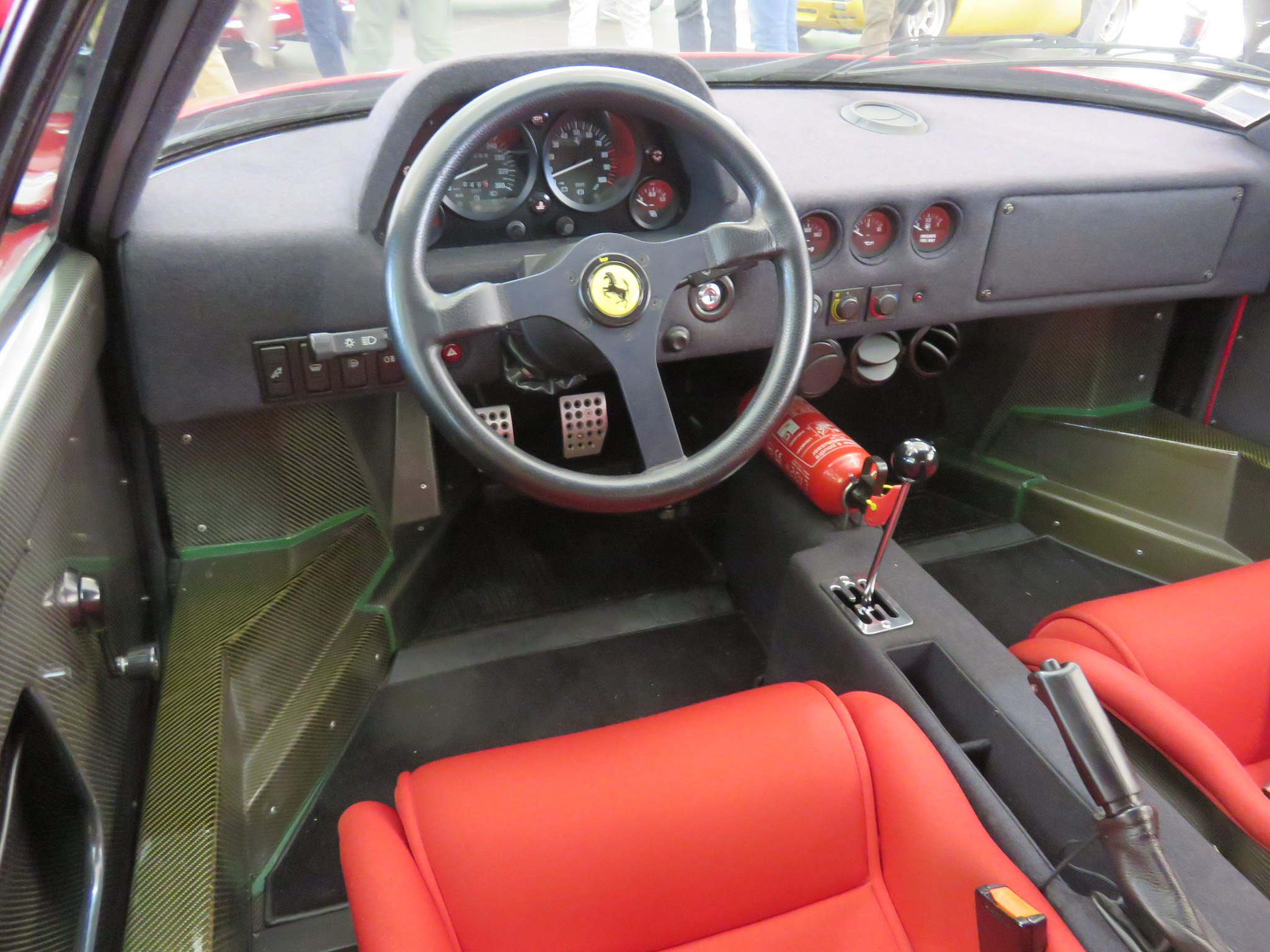 Ferrari F40, Concours d'élégance Villa d'Este 2015